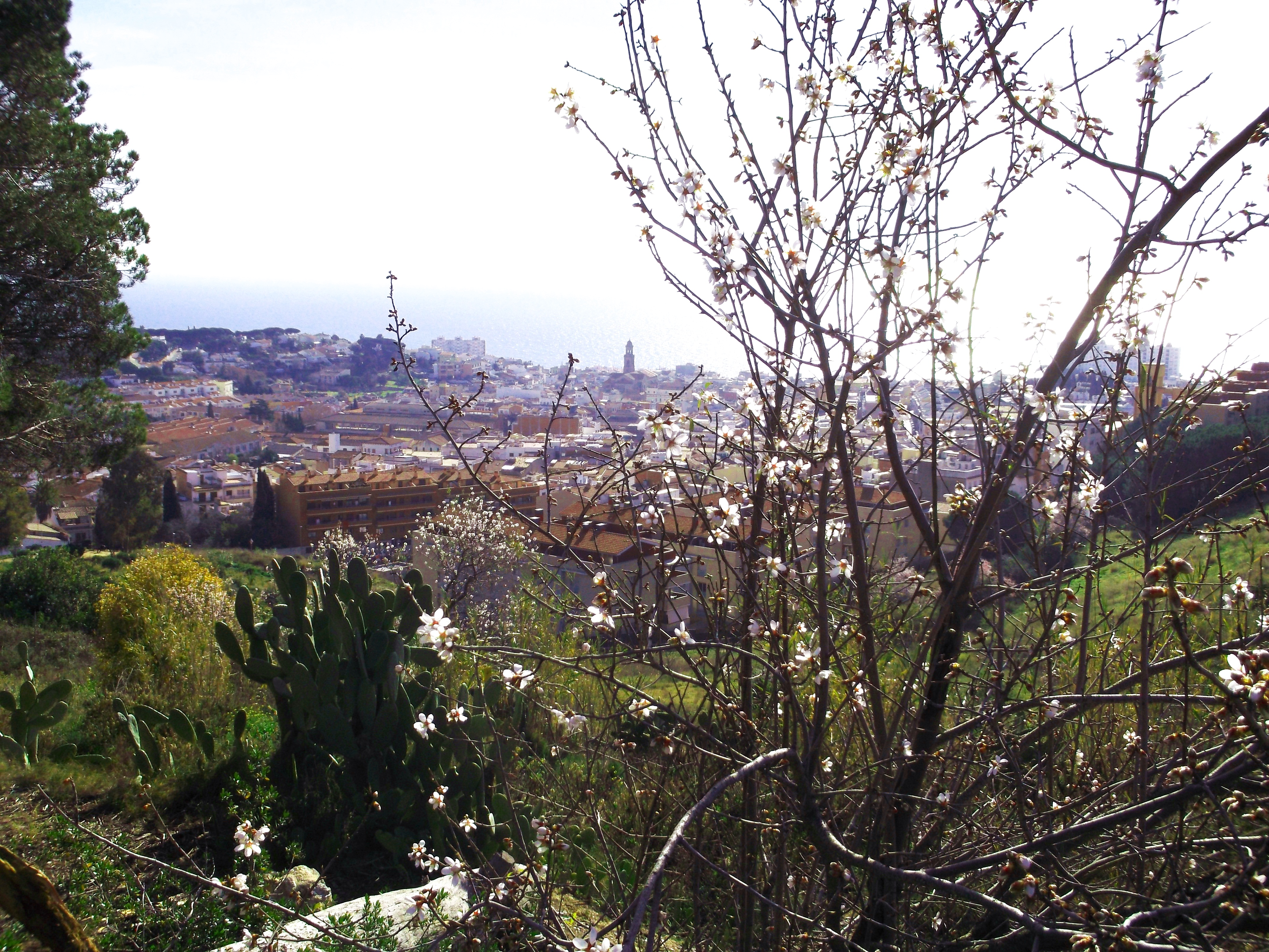 Atmetllers i Canet